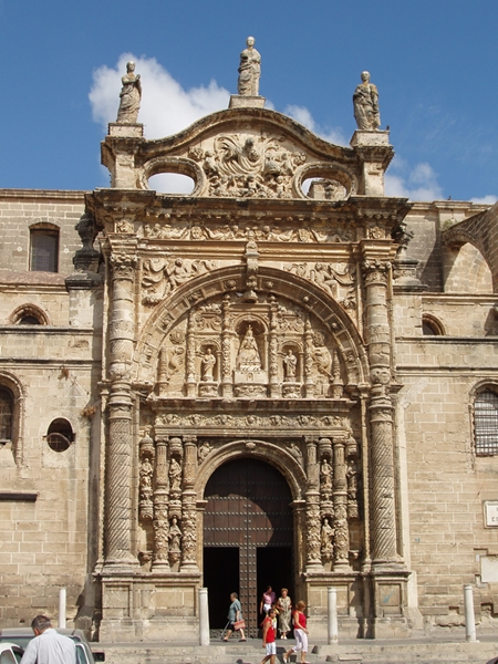 Iglesia Mayor Prioral de El Puerto de Santa María (Cádiz, Andalucía, España)